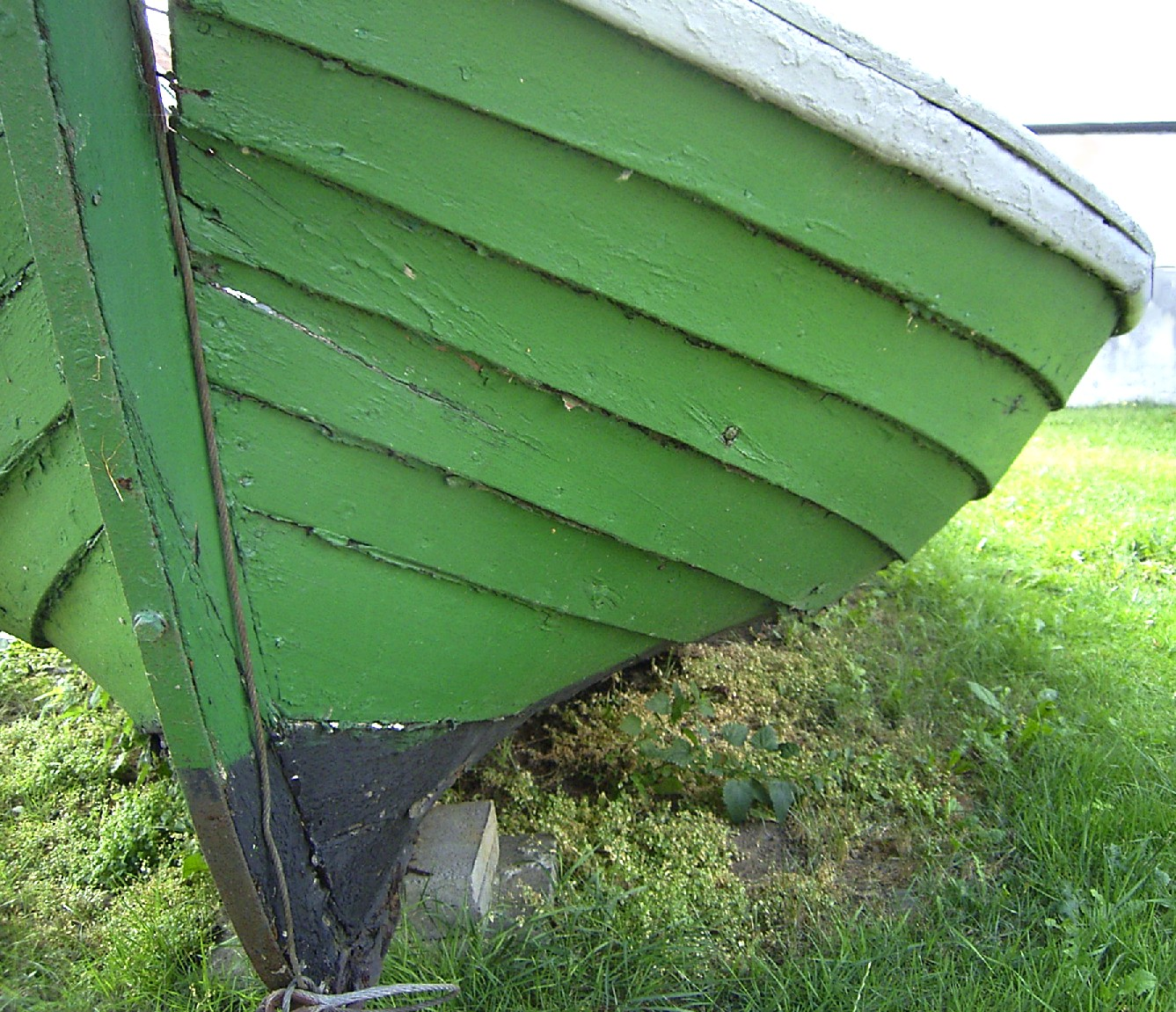 Geklinkerter Rumpf eines alten, etwa 5 m langen Ostseefischerbootes. Das Boot liegt zur Dekoration an Land. Zu erkennen die Auflösungserscheinungen am Bug.